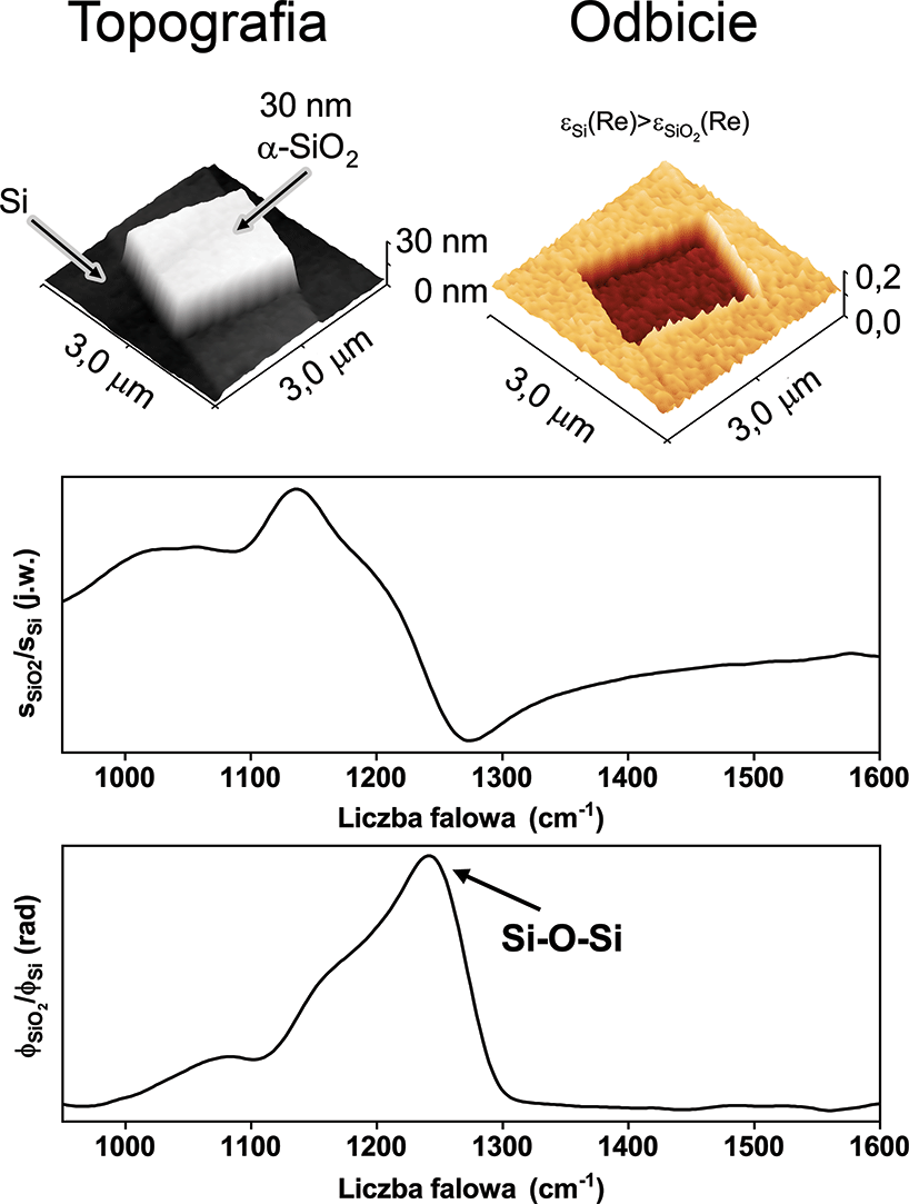 Przykładowe widmo nano-FTIR